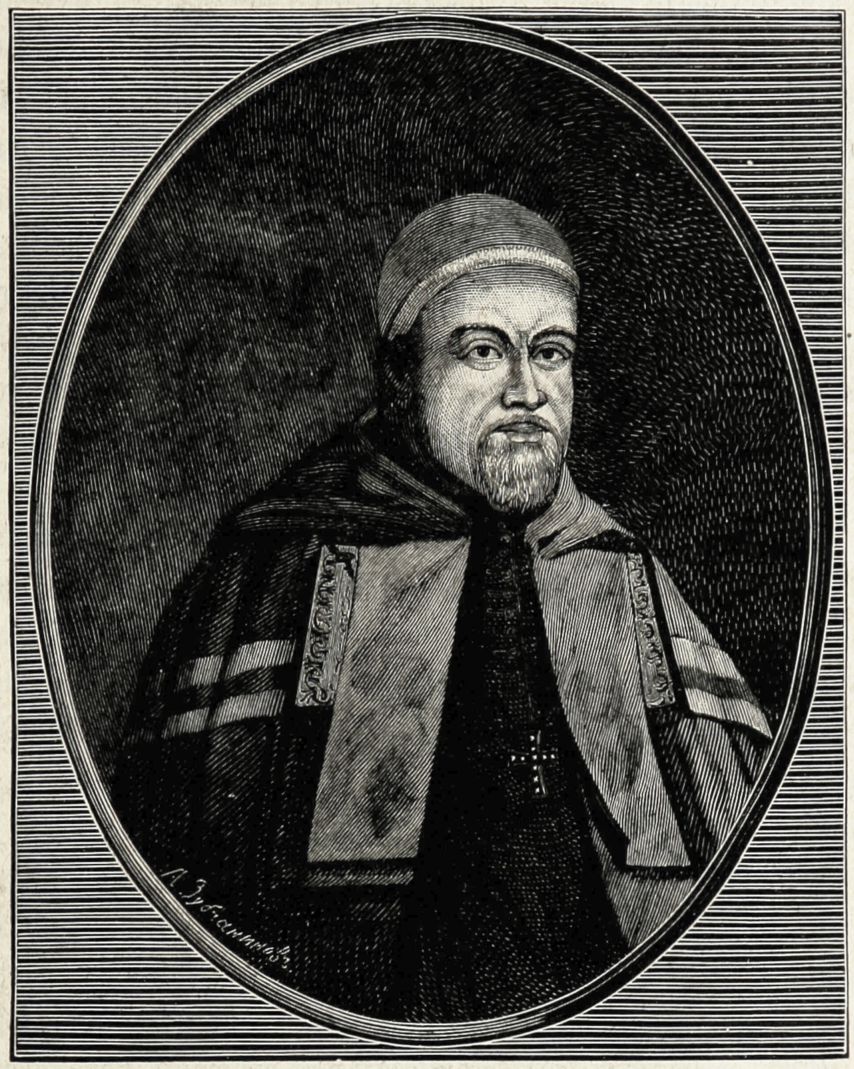 Беларуская (тарашкевіца): Партрэт Льва Кішкі (Leŭ Kiška)